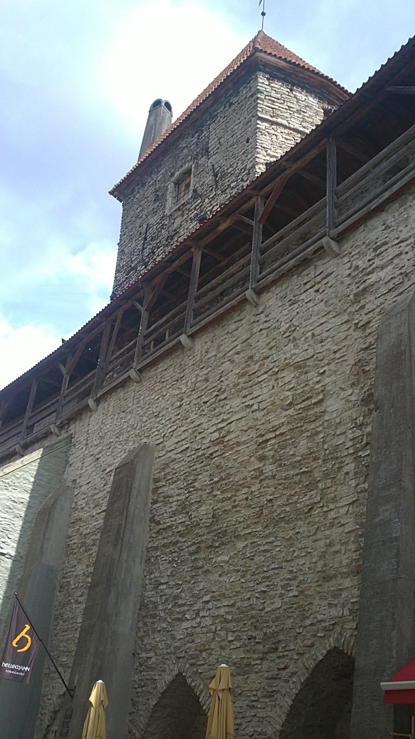 Hellemani torn, Tallinna vanalinnas, linnamüüris, aadressil Müürivahe tänav 48/ Uus tänav 1, vaade Müürivahe tänavalt